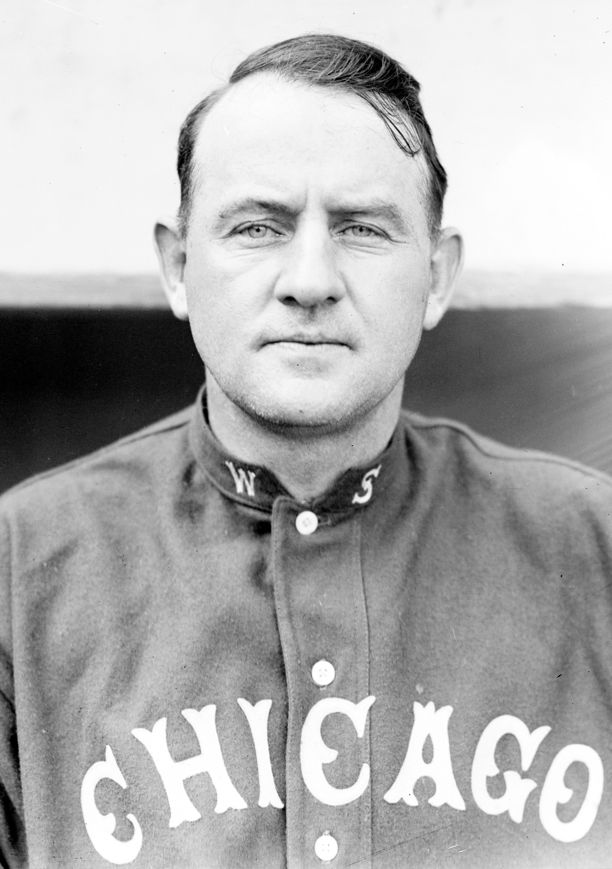 Nixey Callahan, manager, Chicago AL (baseball)